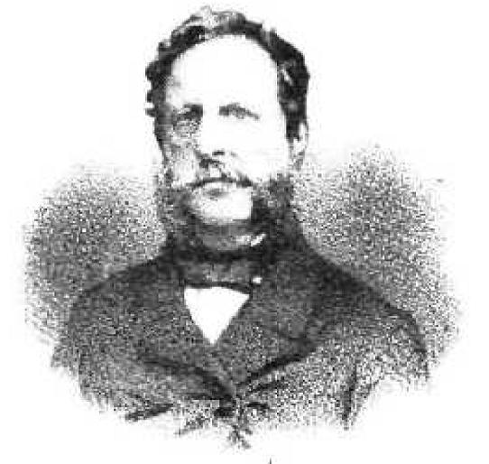 Griechischer Politiker, 19. Jahrhundert